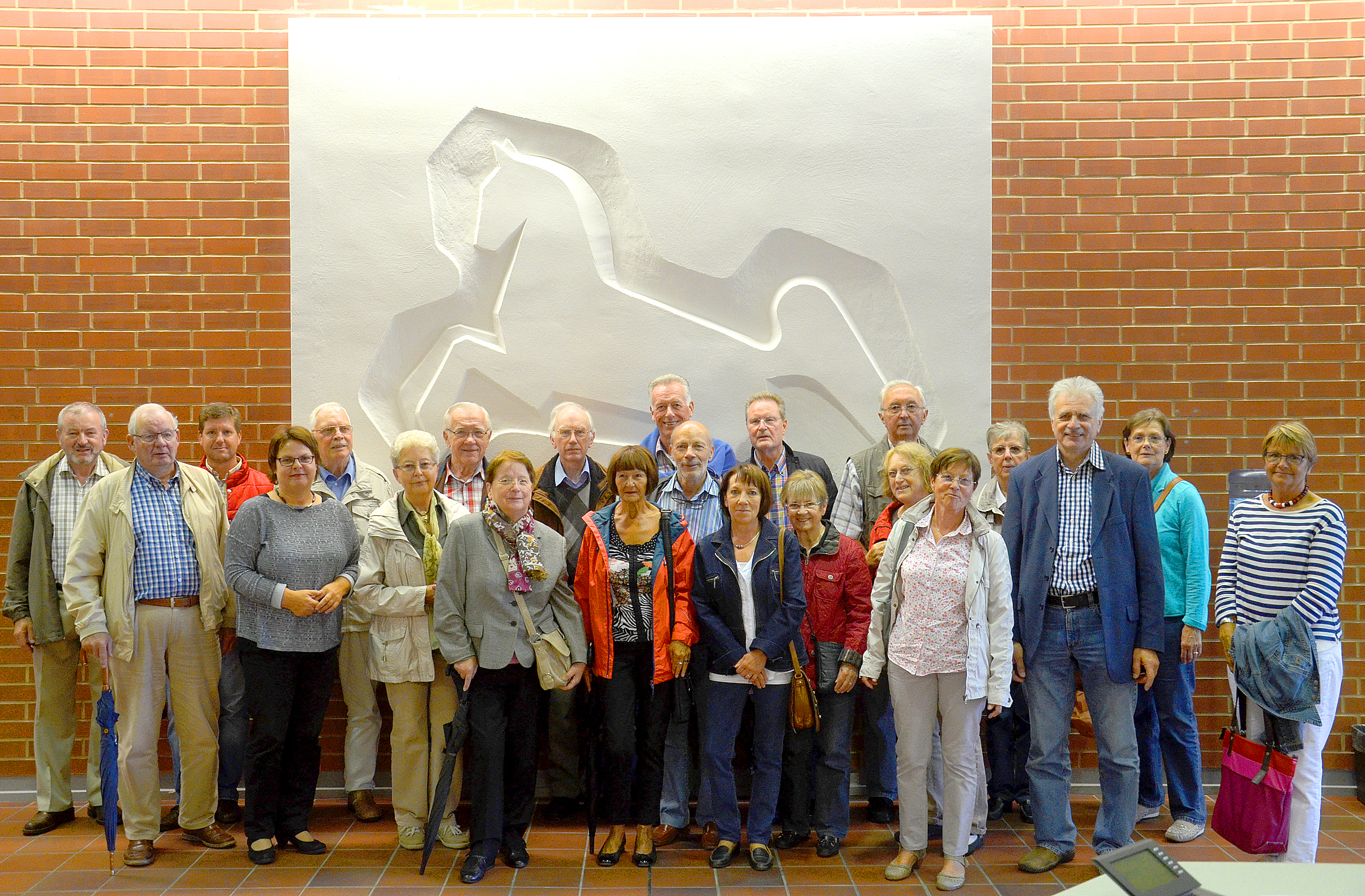 Gruppenbild von Mitgliedern und Begleitern des Vereins Forum 2014 e.V. aus Laatzen sowie der Landtagsabgeordneten Silke Lesemann, hier vor dem vor 50 Jahren aus Gips gemeißelten und frisch restaurierten und am Vortag von Landtagspräsident Bernd Busemann enthüllten Niedersachsenross im Foyer des Niedersächsischen Landtages im Georg-von-Cölln-Haus ...